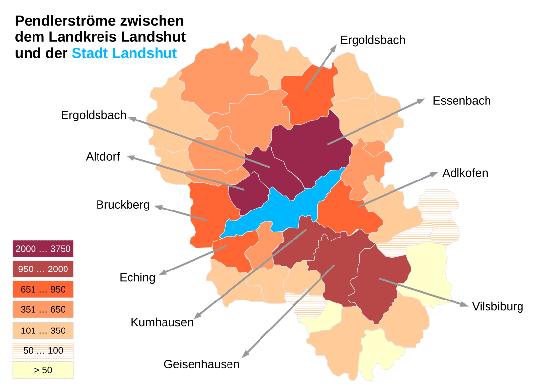 Darstellung der Pendlerströme aus den Gemeinden des Landkreises Landshut in die Stadt Landshut und umgekehrt. Das der Graphik zu Grunde liegende Zahlenmaterial datiert vom 30. Juni 2016 und stammt vom Statistik-Service Südost der Bundesagentur für Arbeit. Die Zahlen waren vom Regionalmanagement für Stadt und Landkreis Landshut im "BERICHT ZUM PENDLERAUFKOMMEN IN STADT UND LANDKREIS LANDSHUT" veröffentlicht worden.